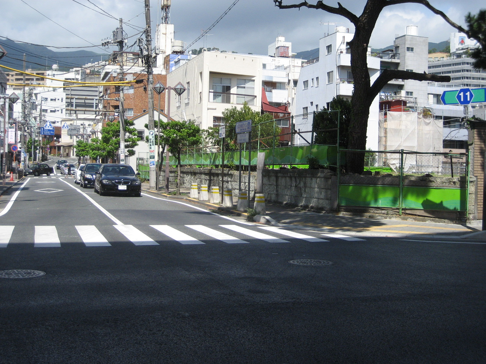 静岡県道11号熱海函南線の起点（熱海市中央町交差点）